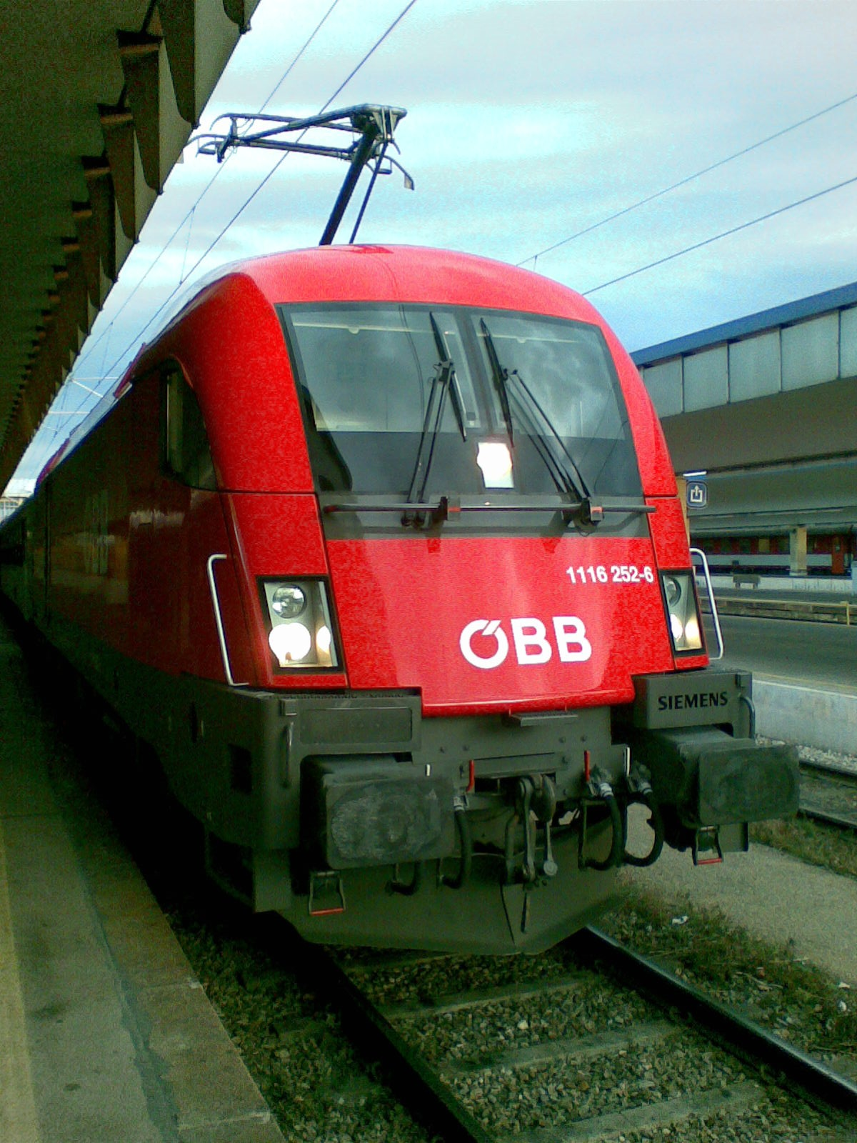 ÖBB 1116 252-6